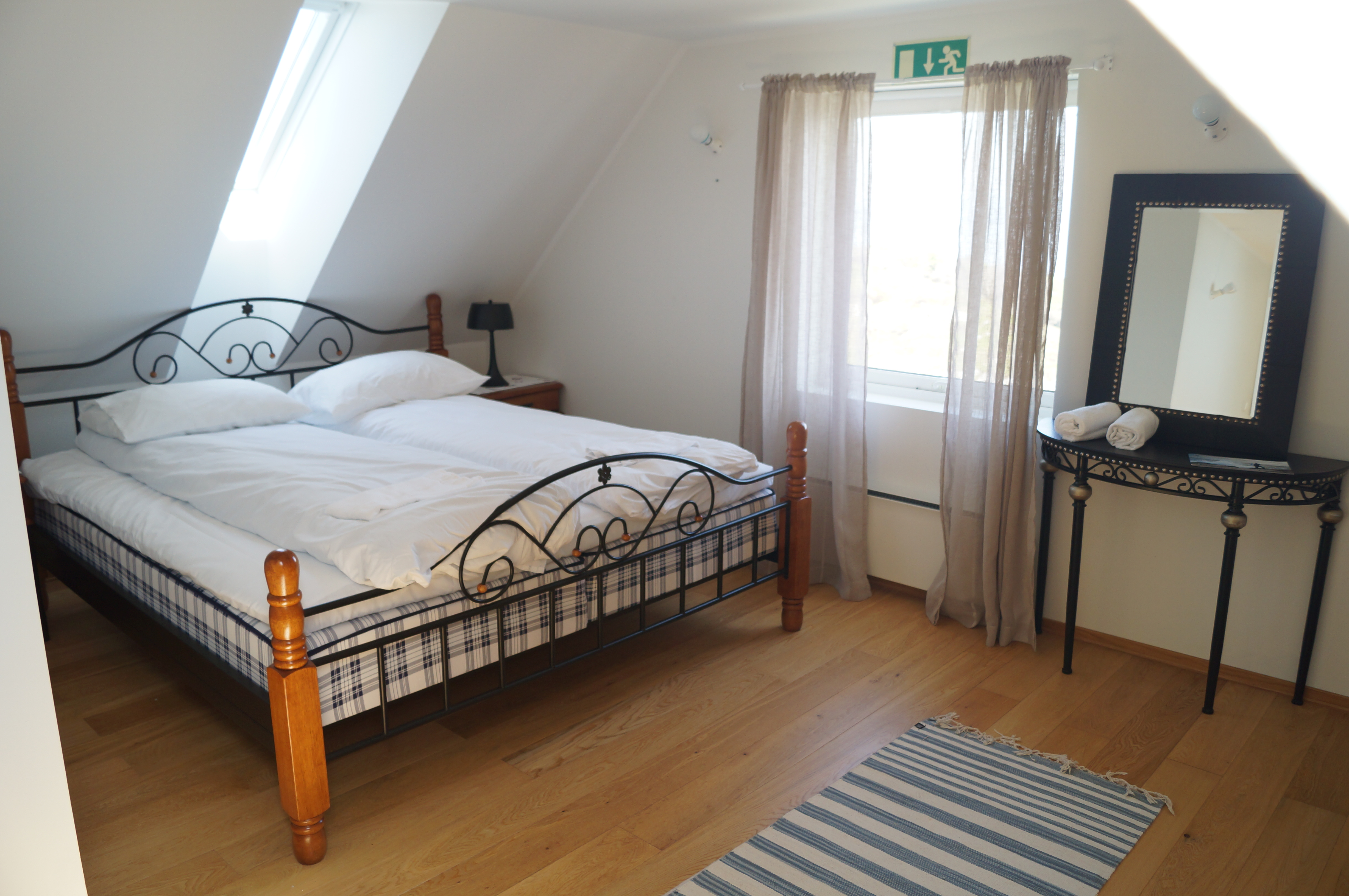 Overnattingsrom på Marstein fyr